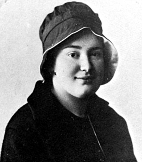 Кузьмина-Караваева Елизавета Юрьевна